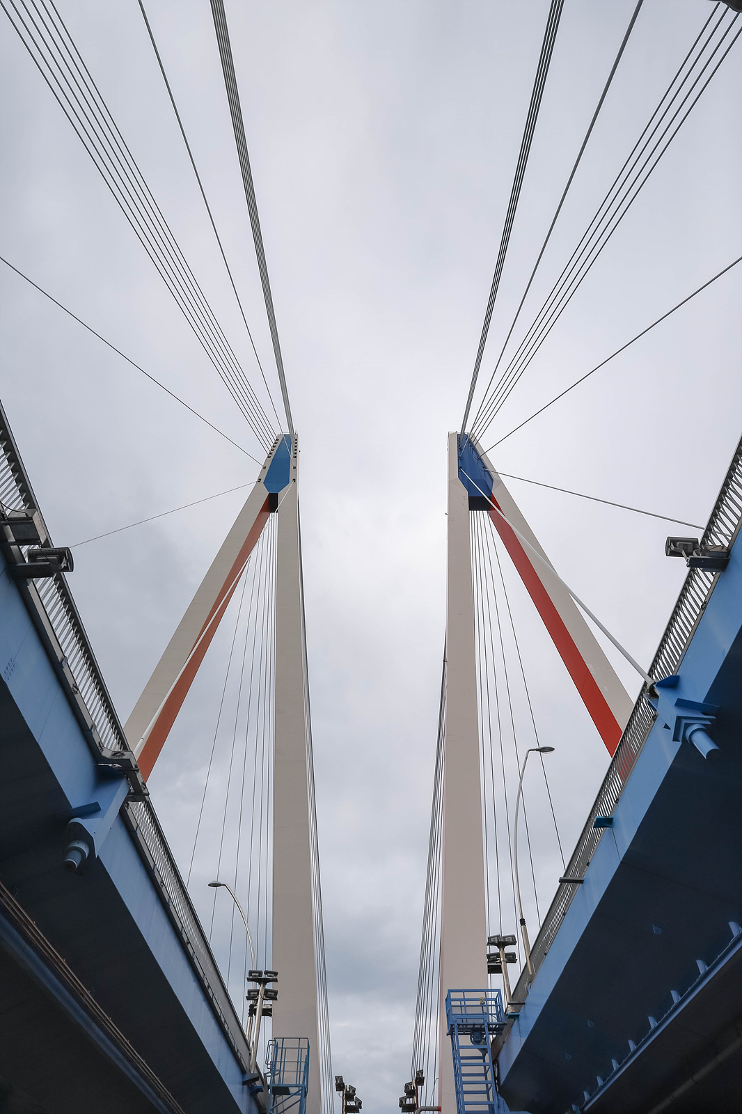 사장교인 진도대교이다.